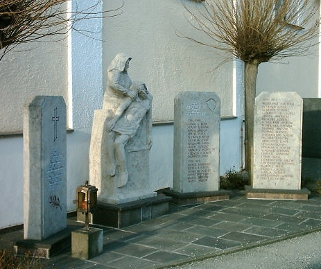 Krieger- und Friedens-Denkmal mit Pietà in Aulzhausen - Gemeinde Affing (errichtet vom Soldaten- und Kameradenverein Mühlhausen-Aulzhausen 1994) Inschriften BETE FÜR DIE VERSTORBENEN UND WIRKE FÜR DEN FRIEDEN DEN GEFALLENEN ZUM GEDENKEN 1914–1918 / (11) Grabler Josef, Hartl Lorenz, Mahl Stefan, Mengele Wendelin, Neumair Max, Schmaus Josef, Späth Anton, Späth Johann, Späth Peter, Strauss F. Xaver, Wünsch Max 1939–1945 / (31) Burkhart Michael, Christl Martin, Echerer Josef, Echerer Lorenz, Endres Georg, Erber Max, Fischer Martin, Gollwitzer Georg, Habla Alfred, Hader Andreas, Hartl Anton, Hartl Johann, Hengster Josef, Hollmann Walter, Lerch Gustav, Lichtenstern Jakob, Lindermeyr Johann, Reiter F. Xaver, Reiter Matthias, Rummel Lorenz, Scheicher Anton, Scheicher Stefan, Scholz Felix, Strauss F. Xaver, Strauss Josef, Tränkl Anton, Tränkl Ludwig, Wagner Johann, Wiesmüller Xaver, Winkler Albert, Winkler Peter R. I. P.